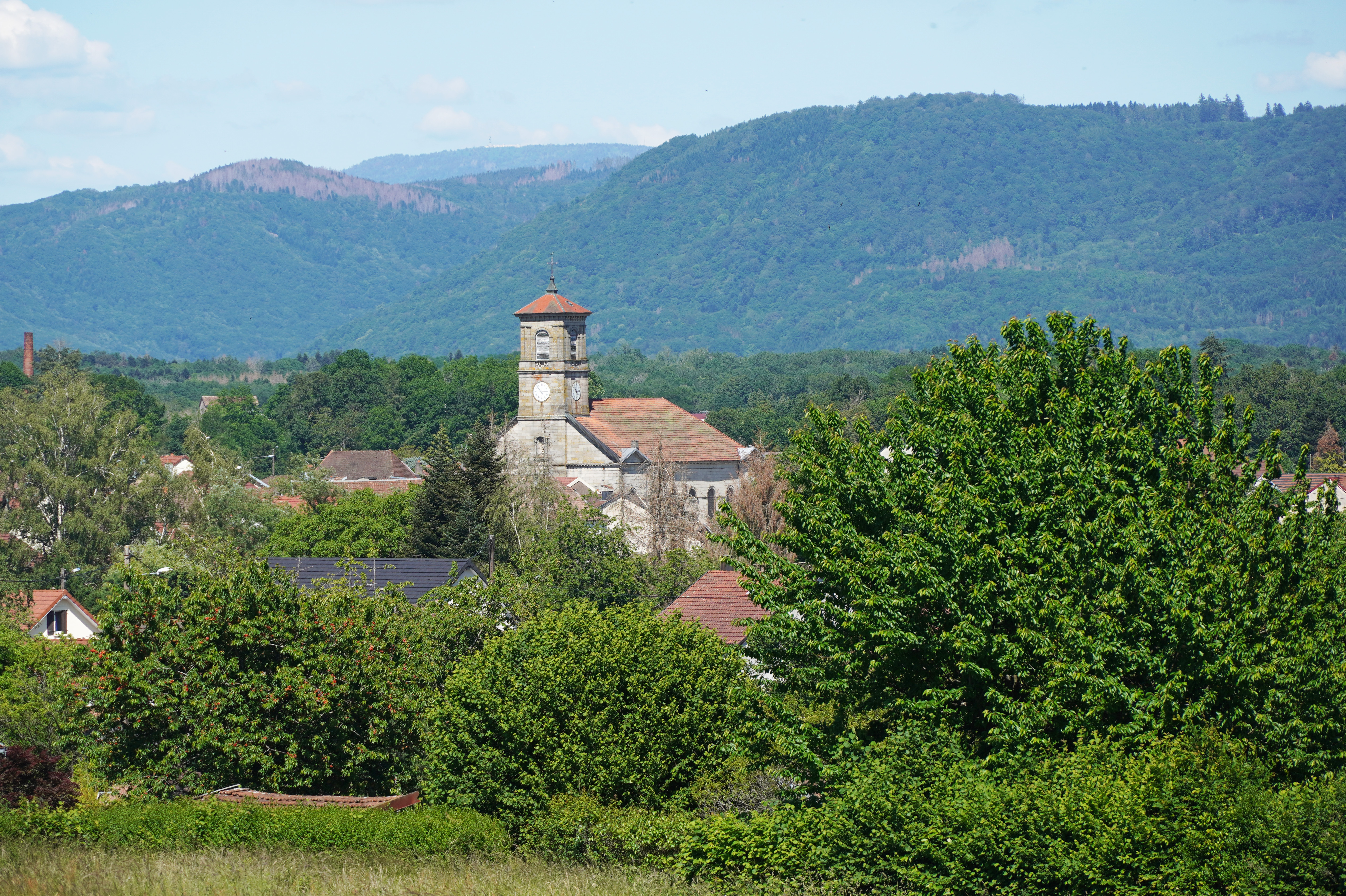 Le village de Saint-Germain en Haute-Saône (70) avec les Vosges en arrière-plan.